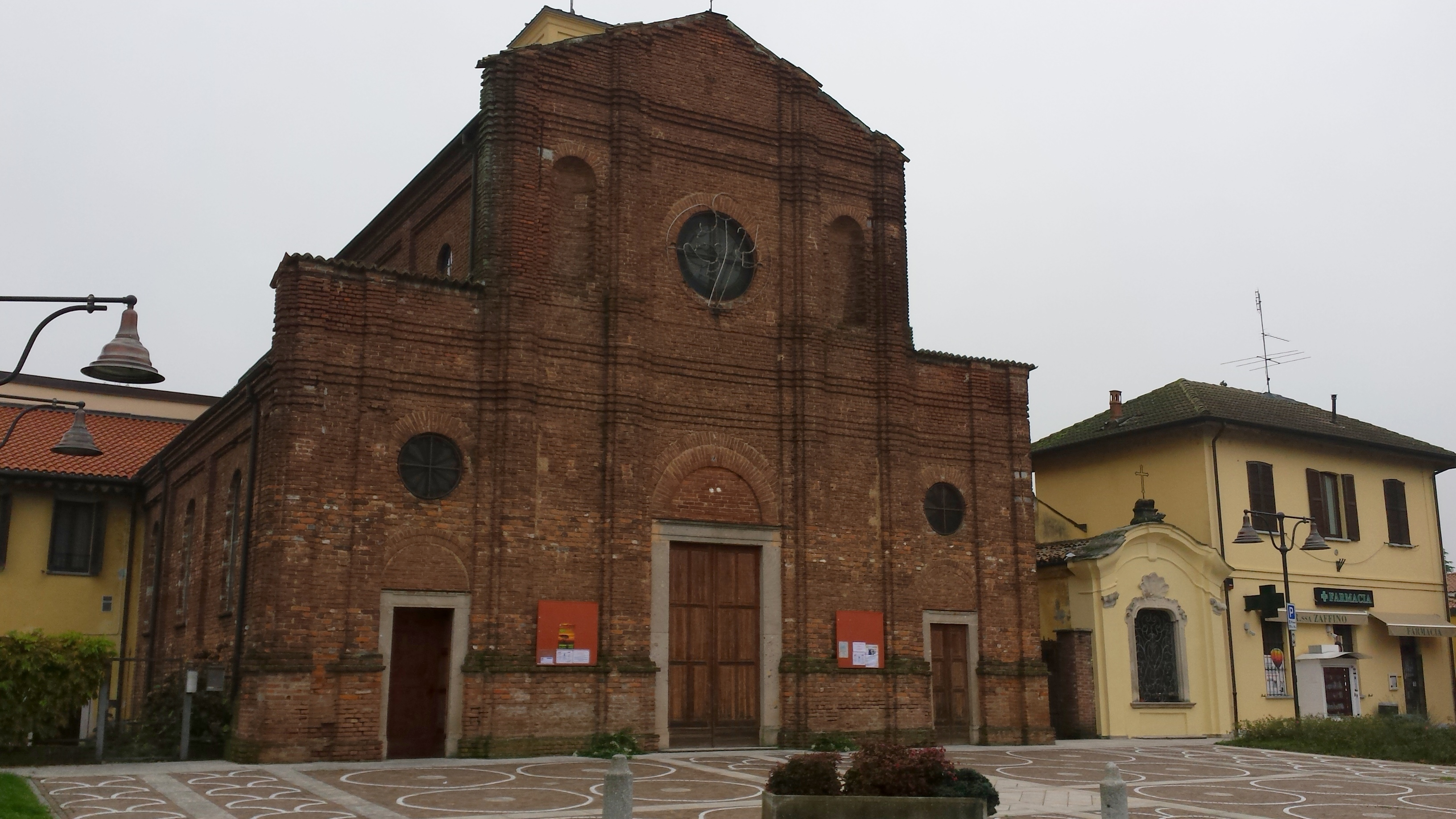 Zelo Surrigone - S. Giuliana E B.v. Del Carmelo - P.zza Roma